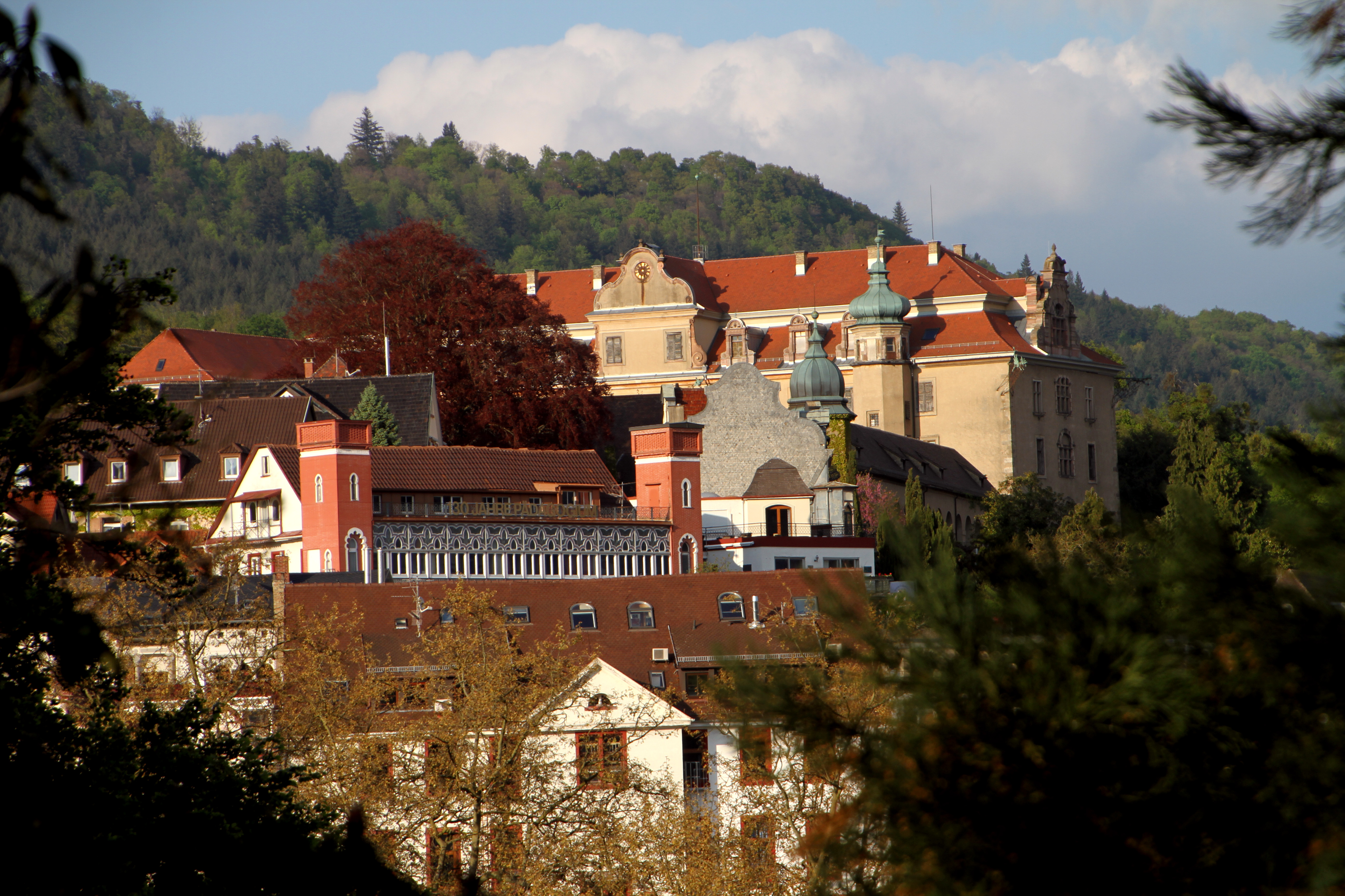 Ansicht von Baden-Baden.